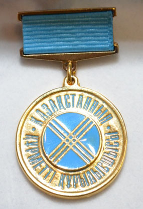 Нагрудный знак "Почётный строитель"